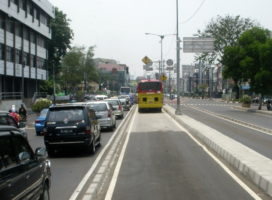 Auf der abgetrennten Busspur können die Busse ungehindert an Verkehrsstaus vorbeifahren.